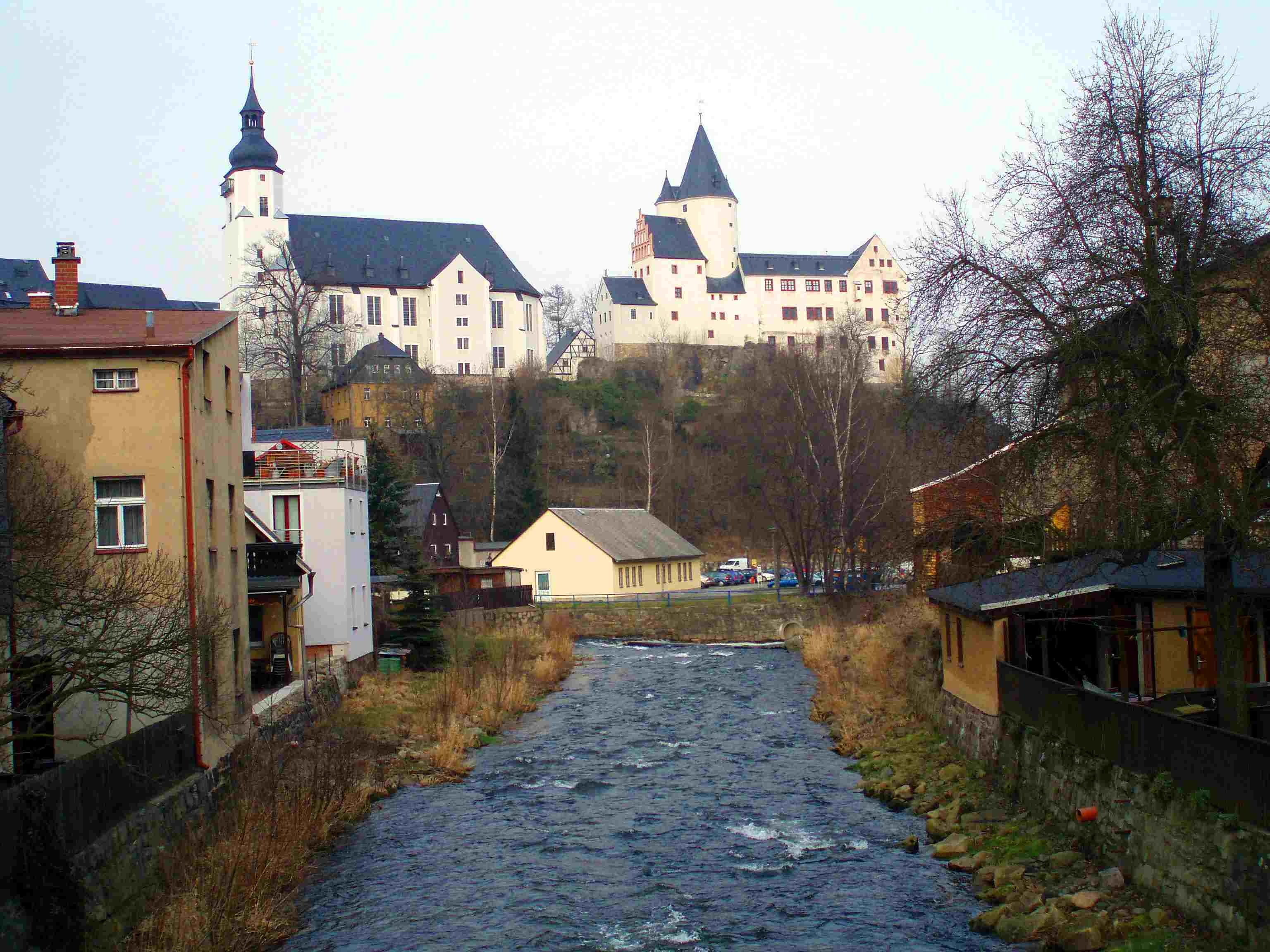 Blick von der Vorstadtbrücke in Schwarzenberg